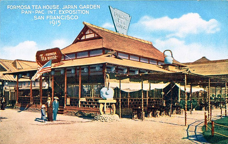 中文（台灣）: 1915年在美國舊金山舉辦的「巴拿馬太平洋國際博覽會」中，出現的台灣茶屋「Formosa Tea House」，上面有大茶壺造型的裝飾。 「巴拿馬太平洋國際博覽會」名義上是為了慶祝巴拿馬運河開通而舉辦的博覽會，台灣也以茶葉為主題參展，並有專屬的展覽建築。